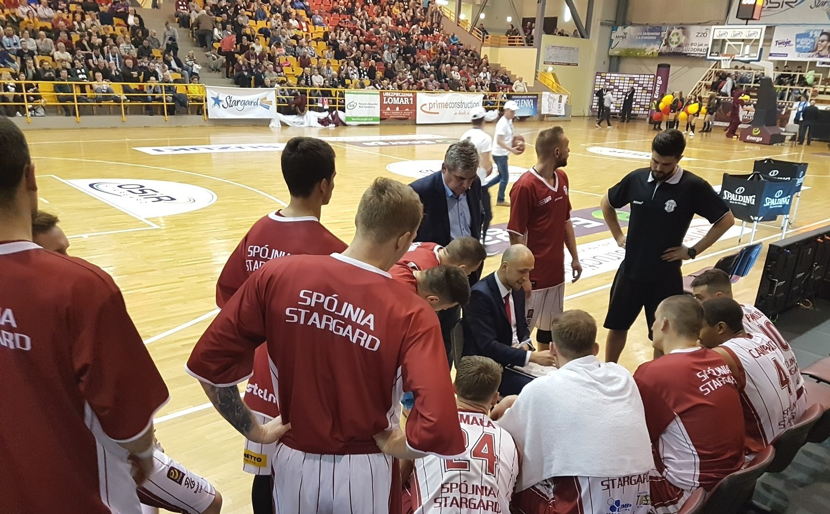 Kamil Piechucki Spójnia Stargard